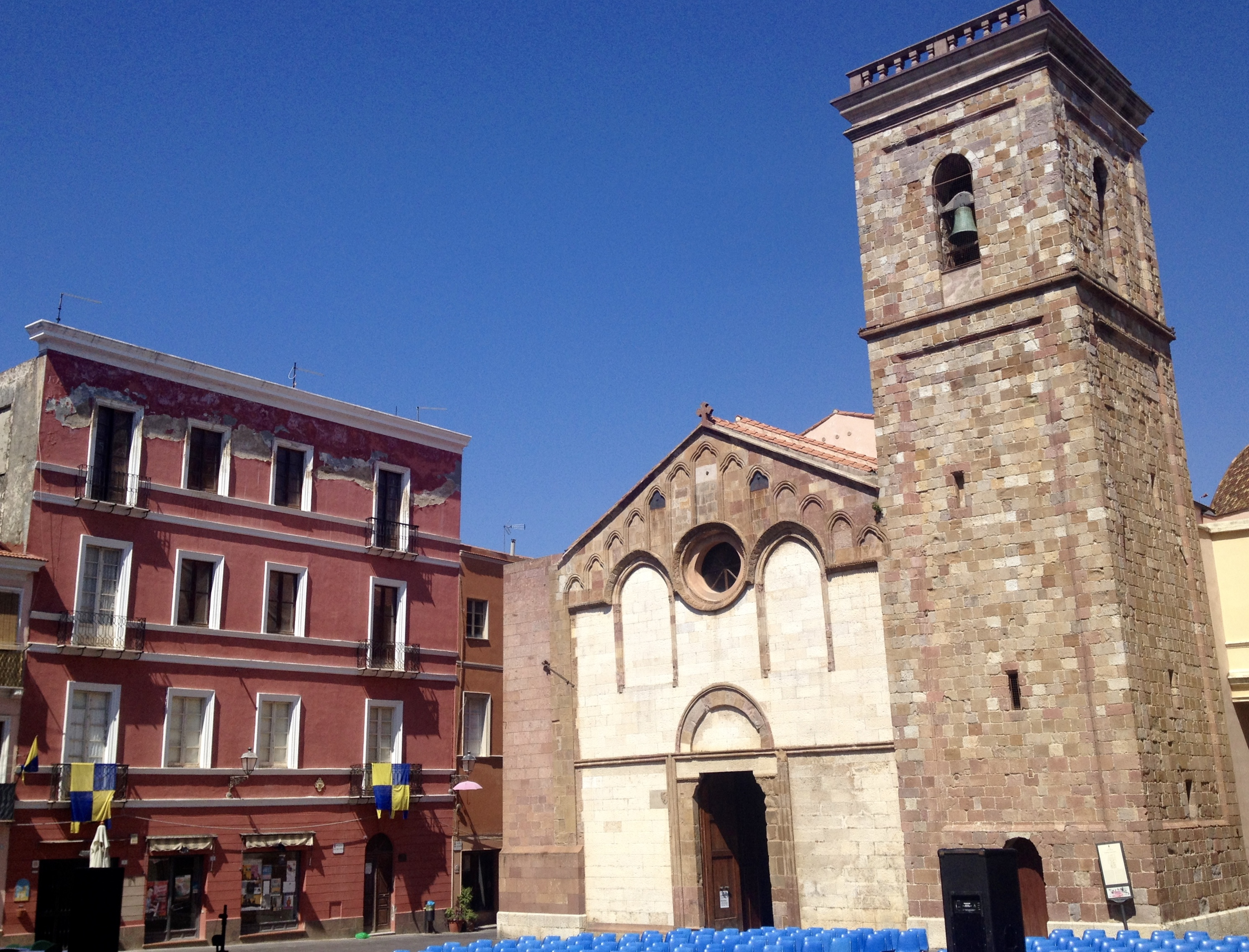 Palazzo Salazar (XVI) e Cattedrale di S. Chiara in Piazza Municipio